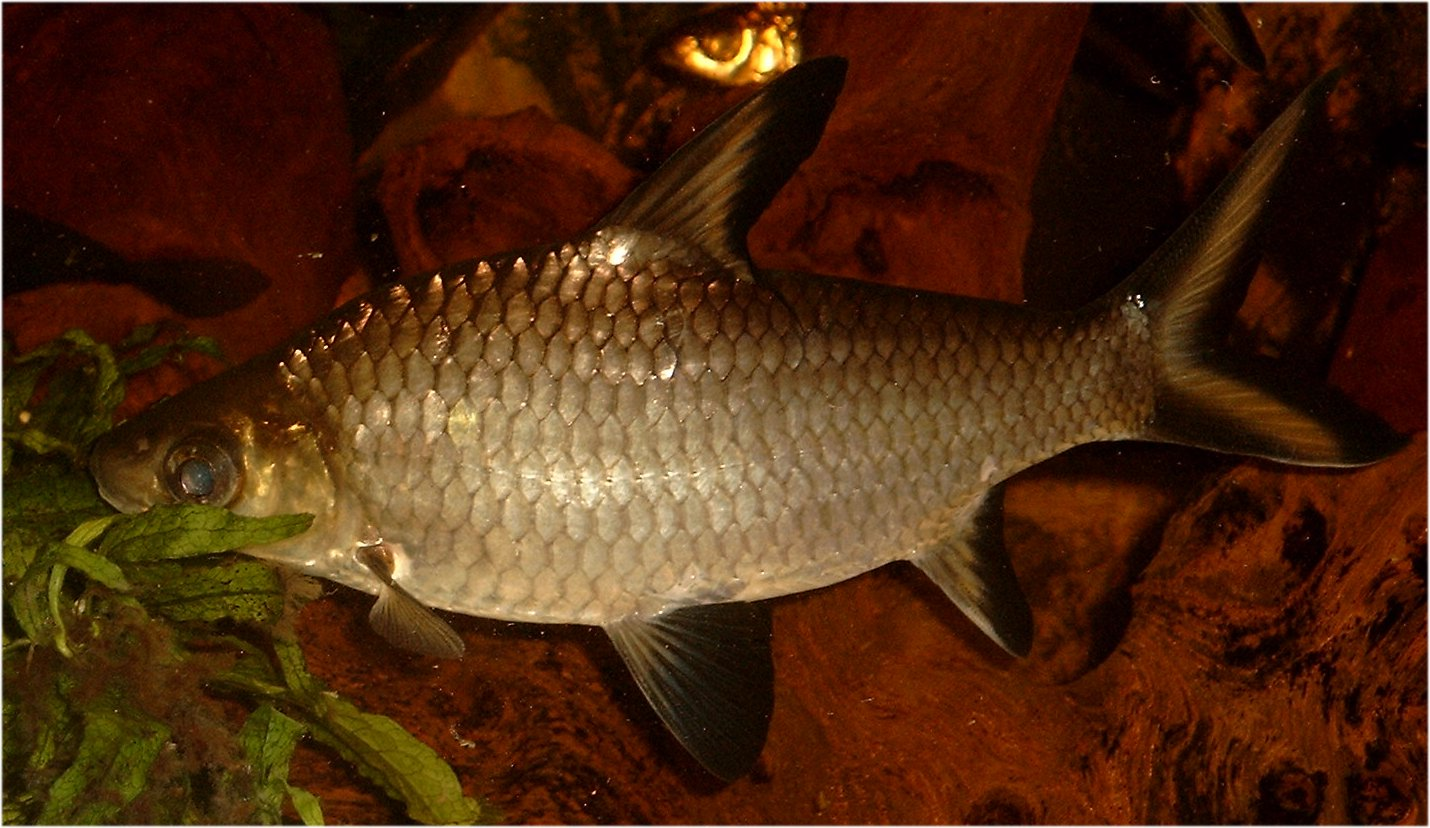 Haibarbe (Balantiocheilos melanopterus), weiblich (female), 2 Years old, Length 15 cm